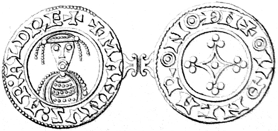 Pfennig-Münze aus dem condominium von Magnus I. dem guten und Harald III. Hardråde 1047. Text: Adv: + MAHNUS ARALD REX. Rev: OVÐNCAR ON OÐN. 0,75 g. Feingehalt 875 ‰.